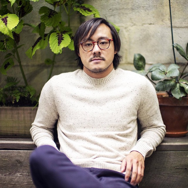 Brian Lam